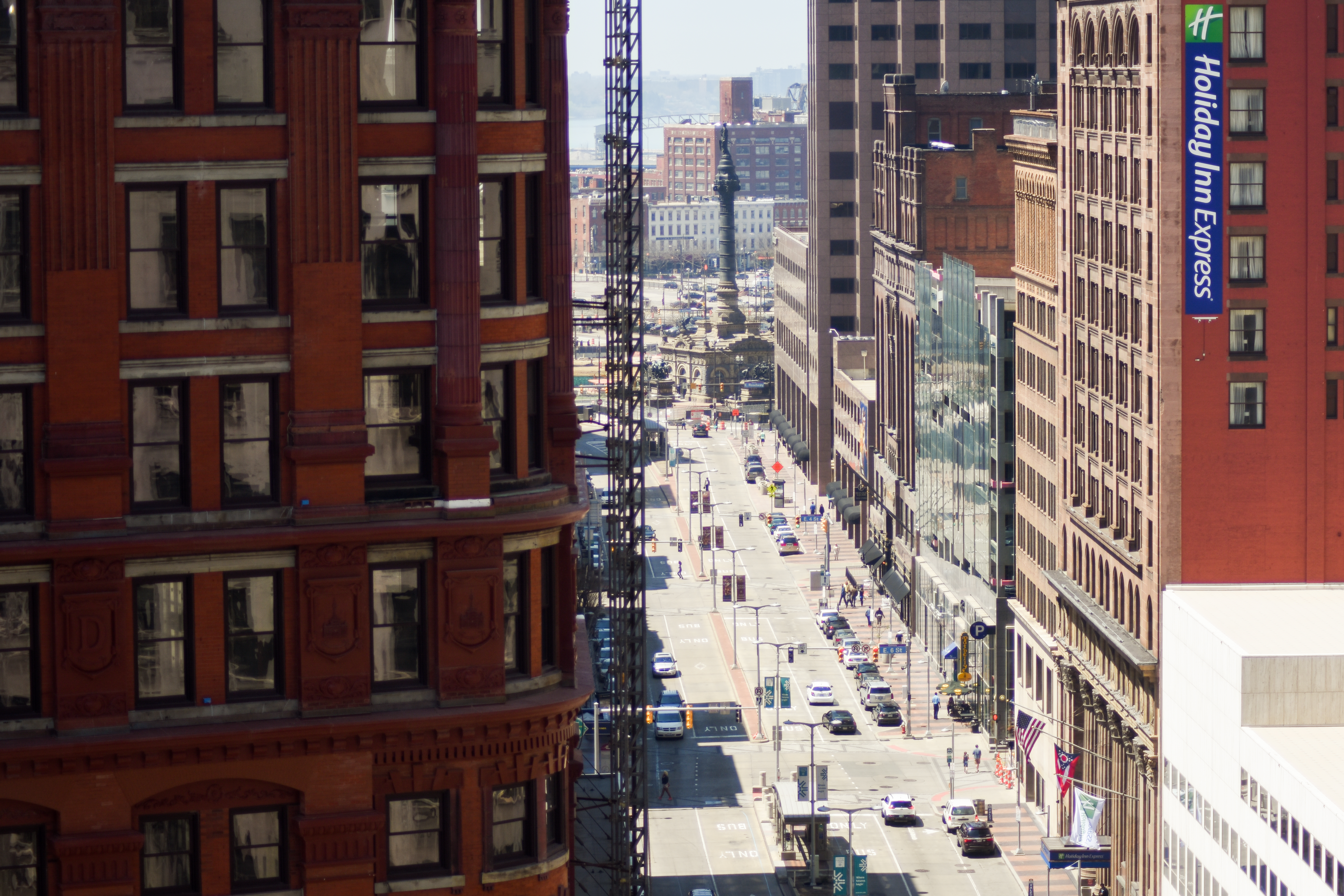 Azure Cleveland